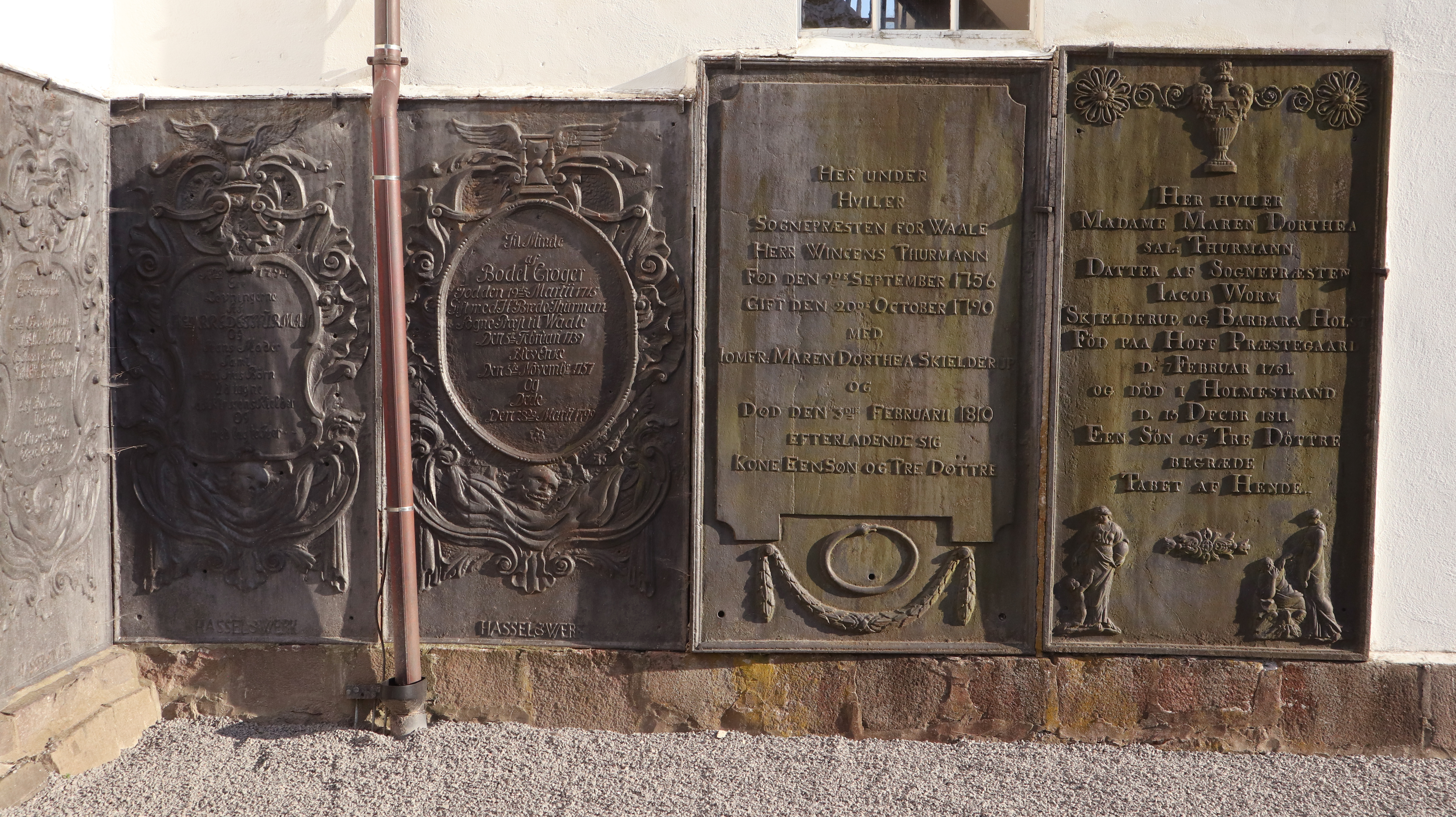 Gravplater, støpt i jern, fra 17 og 18-hundretallet, prod v Hassel jernverk